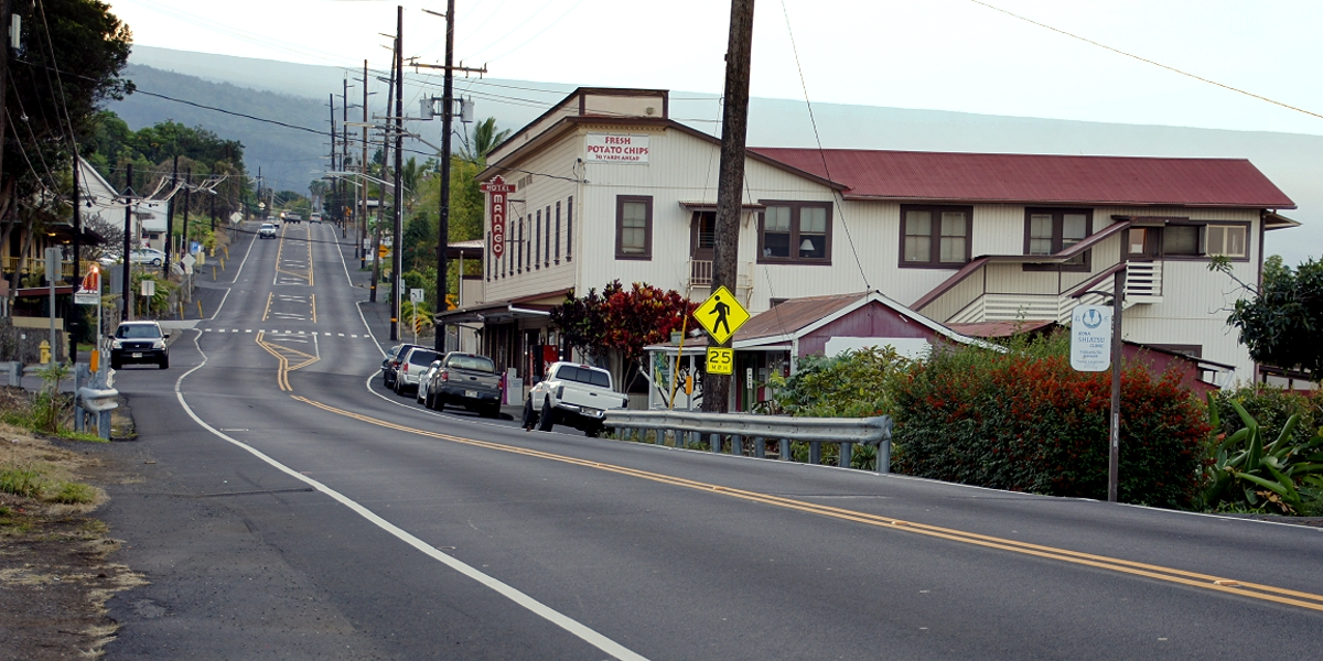 Иллюcтрация для викиучебника Гавайеведение